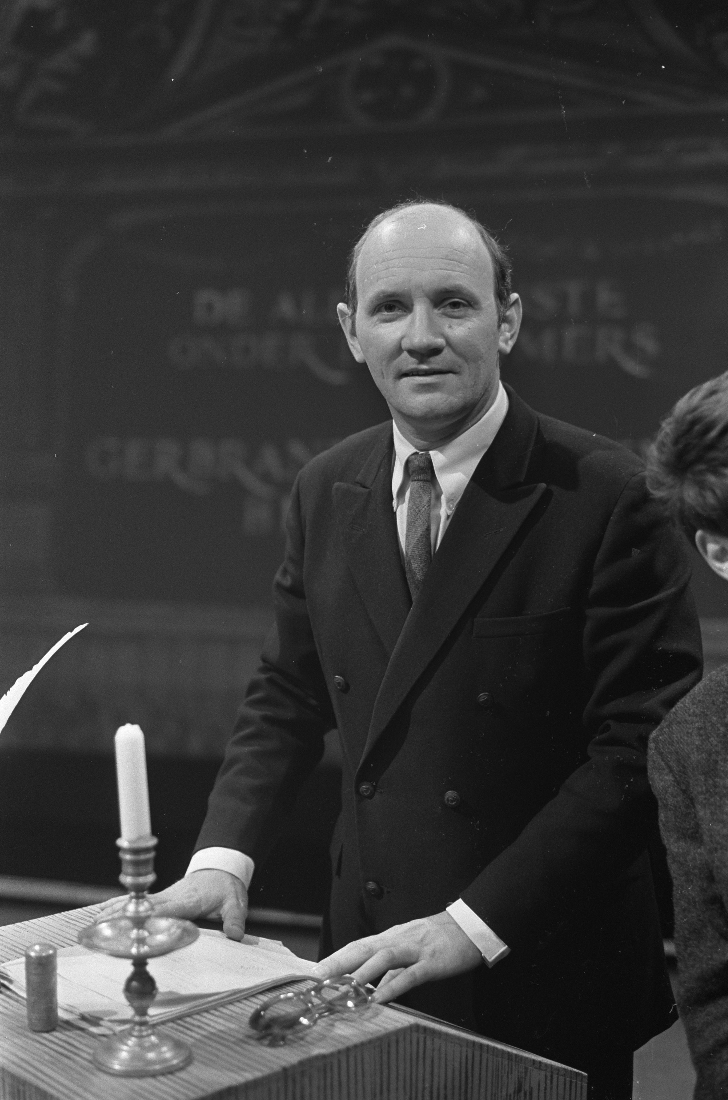 Collectie / Archief : Fotocollectie Anefo Reportage / Serie : TV-spel "De Alderminste onder de Rijmers" Beschrijving : André van den Heuvel als regisseur Datum : 6 september 1968 Trefwoorden : portretten, regisseurs, televisiedrama's Persoonsnaam : Heuvel, André van den Fotograaf : Jack de Nijs / Anefo Auteursrechthebbende : Nationaal Archief Materiaalsoort : Negatief (zwart/wit) Nummer archiefinventaris : bekijk toegang 2.24.01.05 Bestanddeelnummer : 921-6572 Reacties Geplaatst door Televisiespel liefhebber op 06 september 2017 - 11:35. KRO Televisie. Uitgezonden op 17 september 1968 NB. Dit programma werd uitgezonden in het kader van de herdenking van de 350-e sterfdag van Gerbrand Adriaenszoon Brederode.